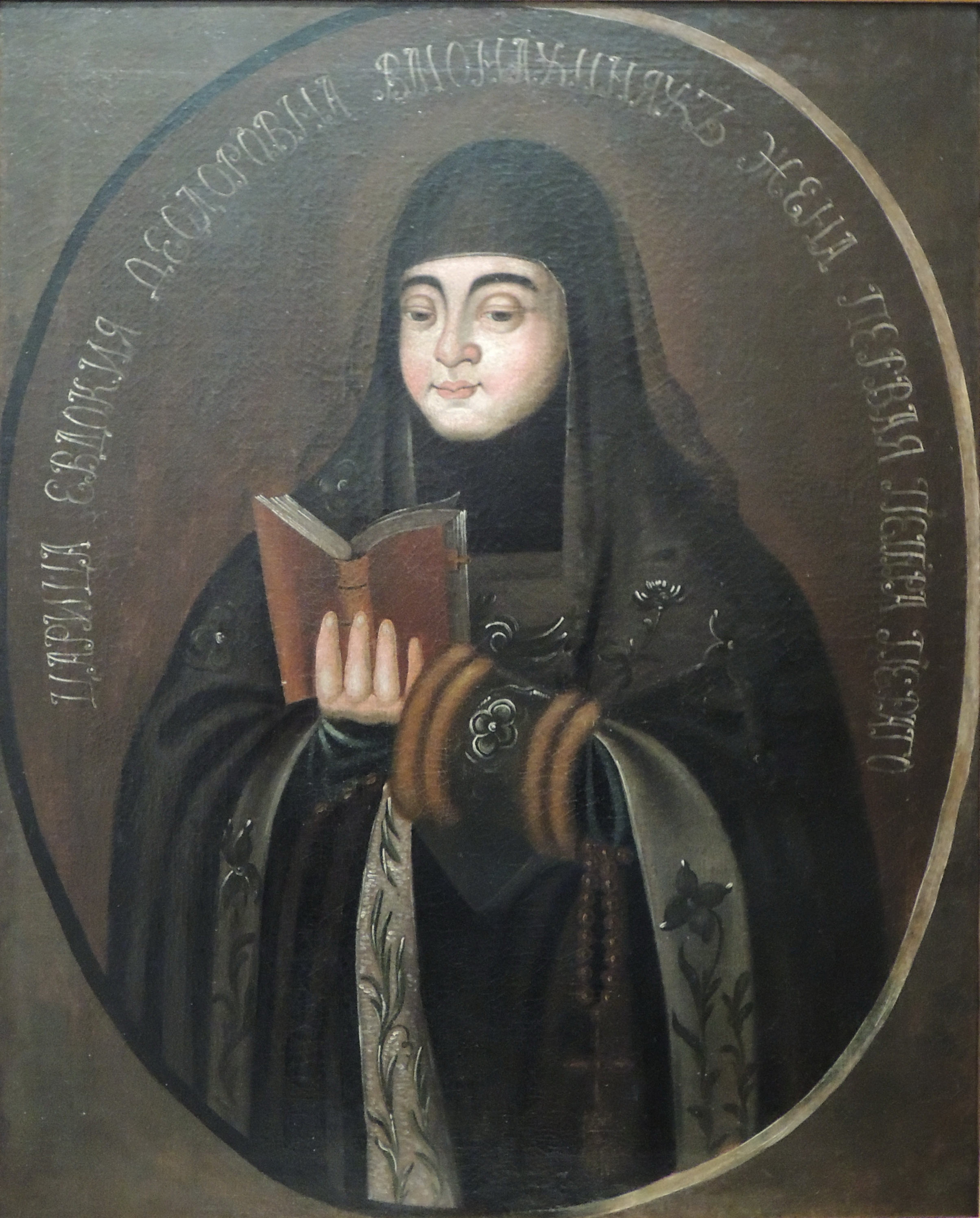 Выставка "Романовы. Начало династии", приуроченная к 400-летию избрания на царство Михаила Федоровича Государственный Исторический музей, весна 2013 года